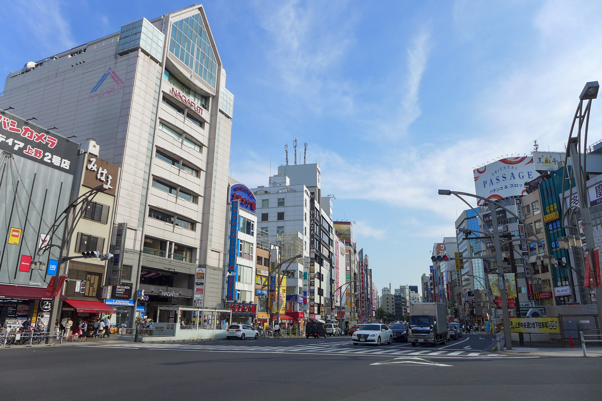 Ueno